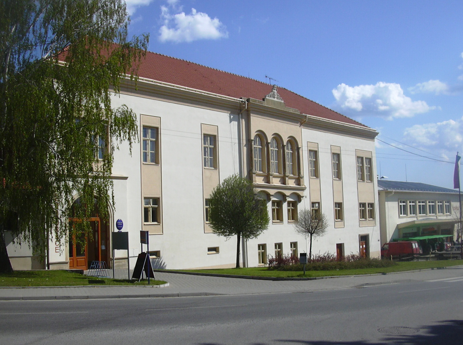 Zámek a zároveň obecní úřad Drnovice (Vyškov District, Czech Republic)